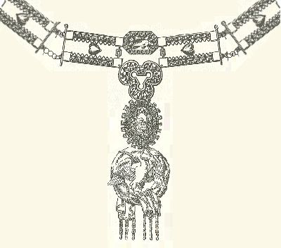 Order van de Zwaan, Ordre de la Cygne, Schwanenorden, Order of the Swan. Keten